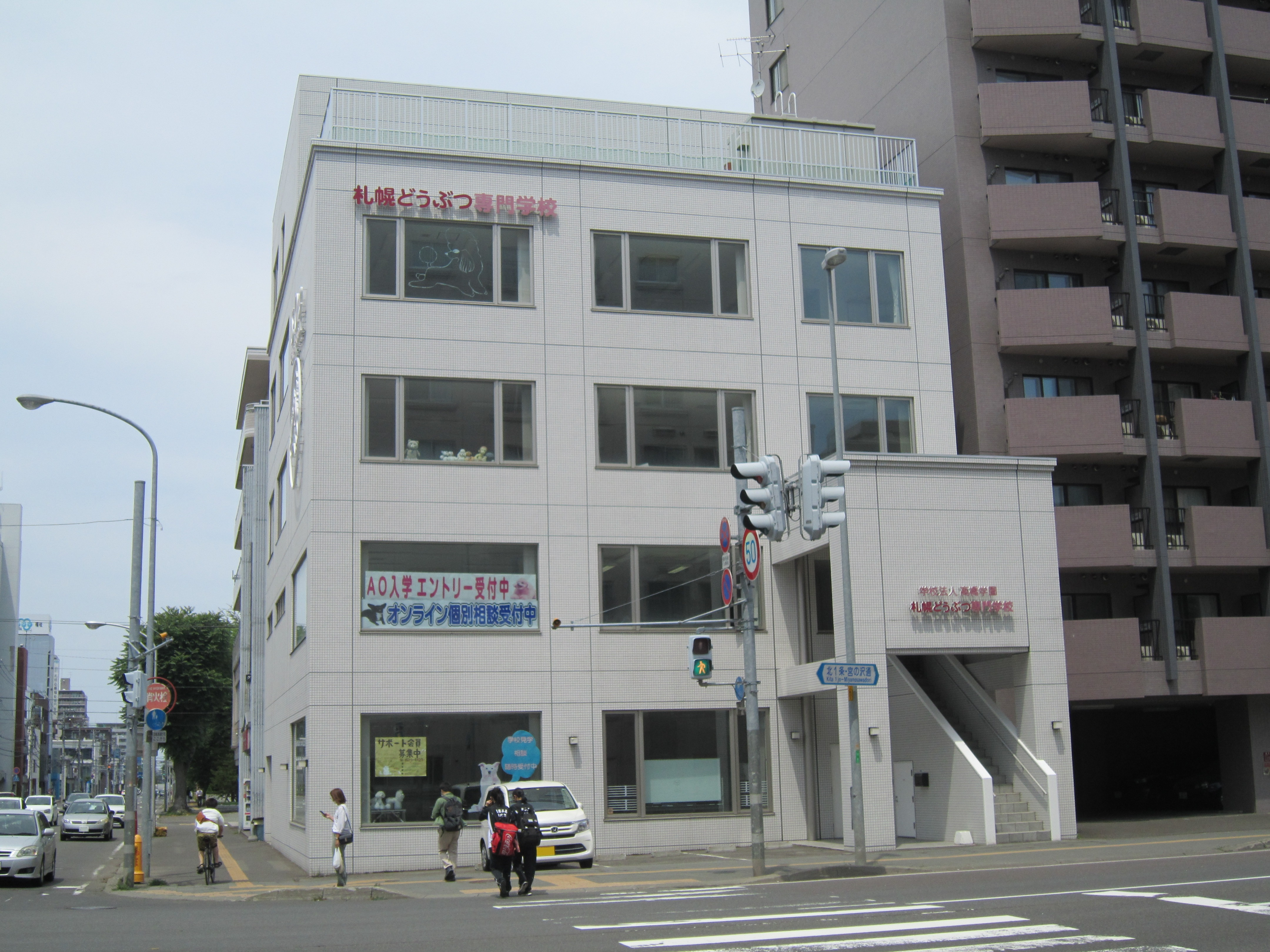 札幌どうぶつ専門学校